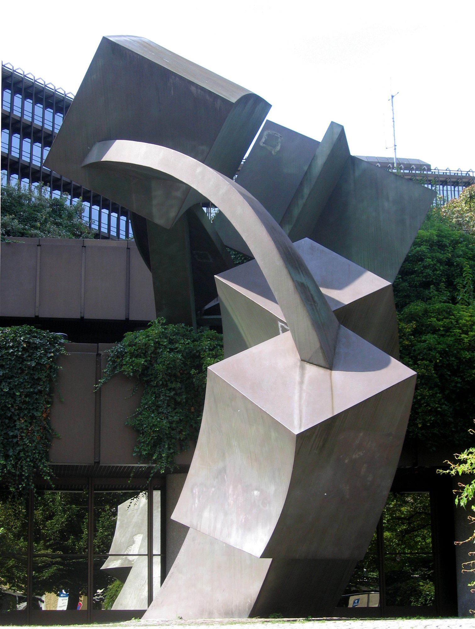 Phillip King: Cross-Bend (1978-80), am Europäischen Patentamt, München